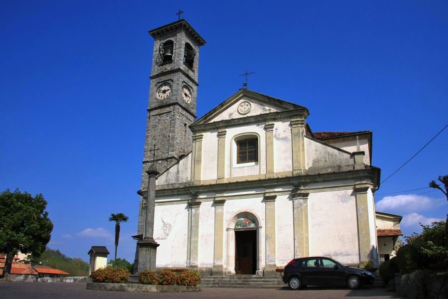 Chiesa parrocchiale di San Giorgio a Nebbiuno (NO)